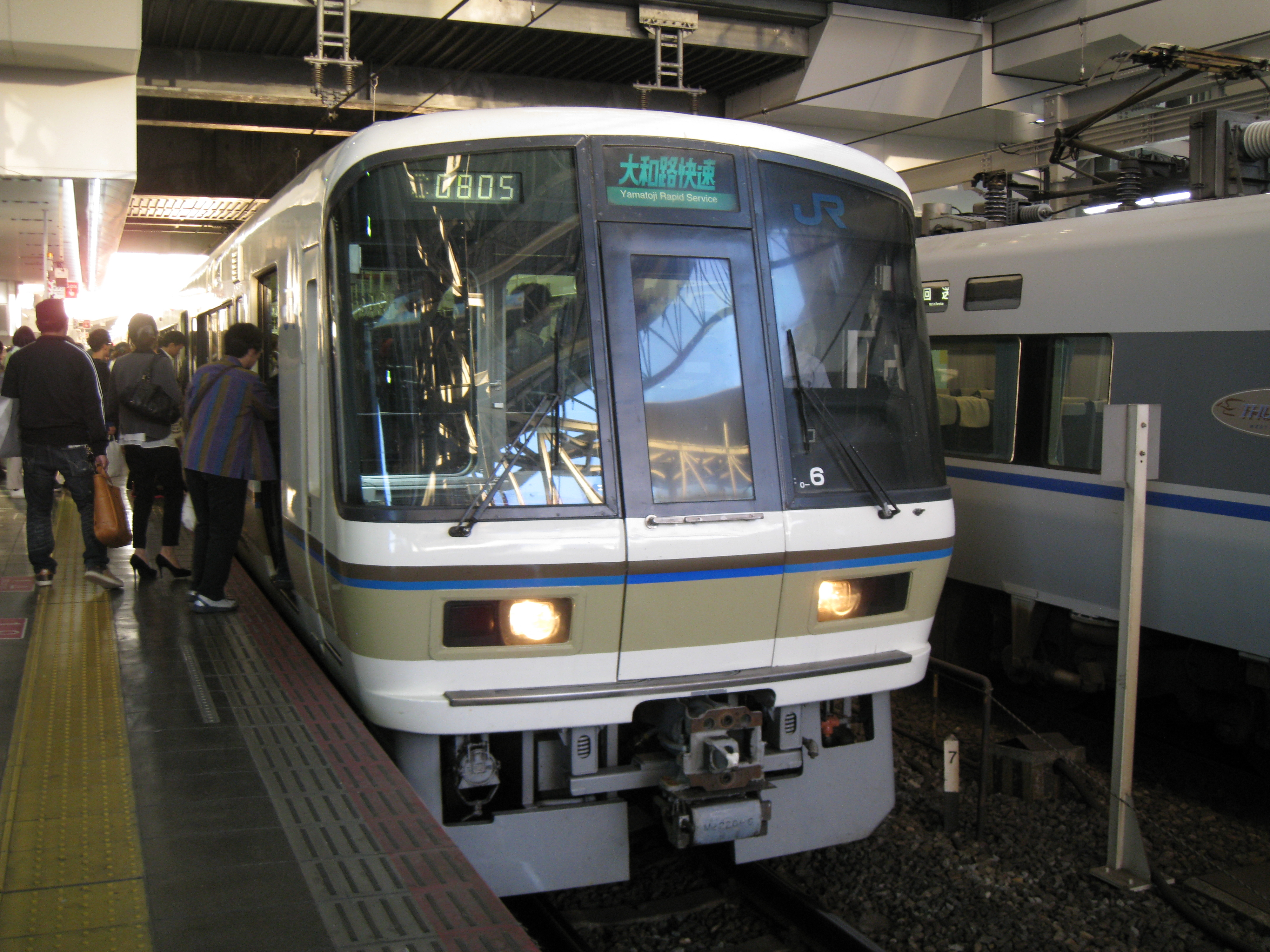 221系大和路快速、大阪駅。